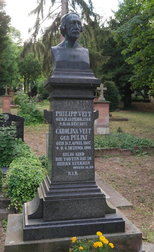 Grab des Malers Philipp Veit, 1793-1877, auf dem Hauptfriedhof Mainz